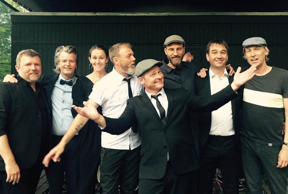 Mek Pek Party Band 2017 - 35 år efter debutalbummet.